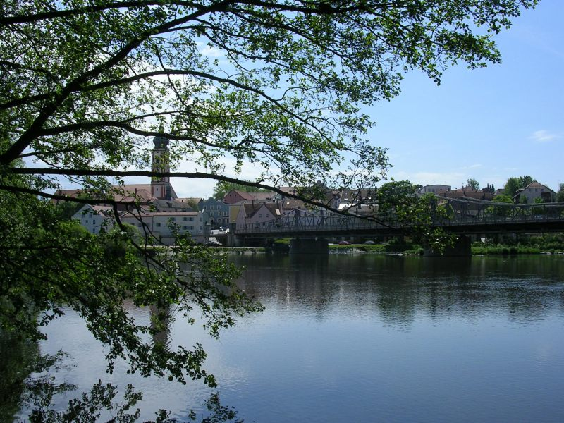 Roding (Oberpfalz) Germany Photographer: S.Fischer